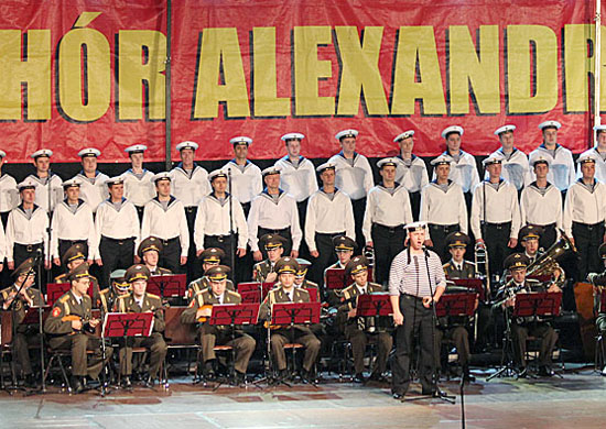 Академический ансамбль песни и пляски имени А.В. Александрова